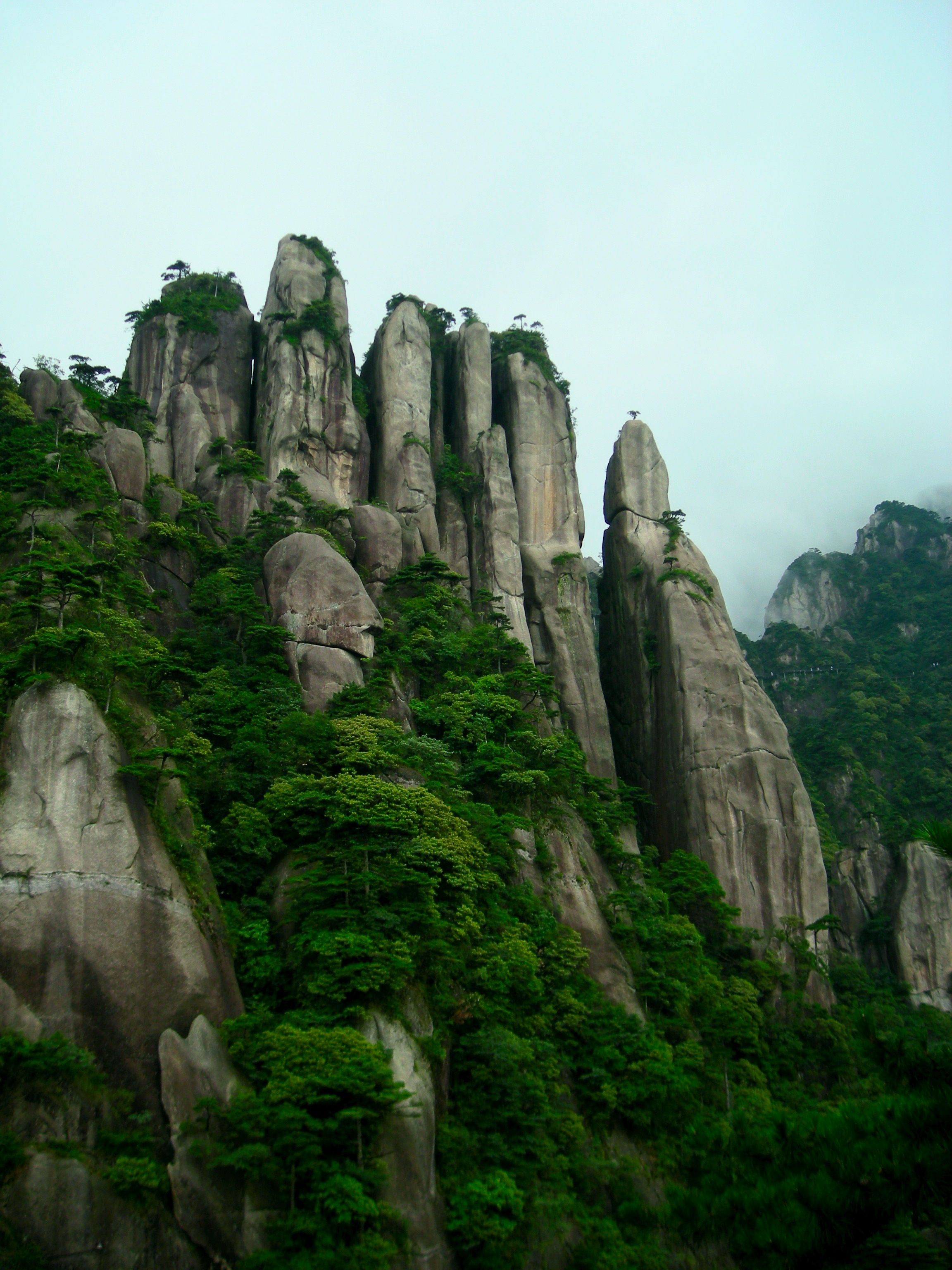 三清山万芴朝天